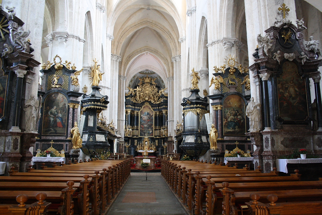 Stiftskirche Lilienfeld, Niederösterreich; Innenansicht Richtung Hochaltar.